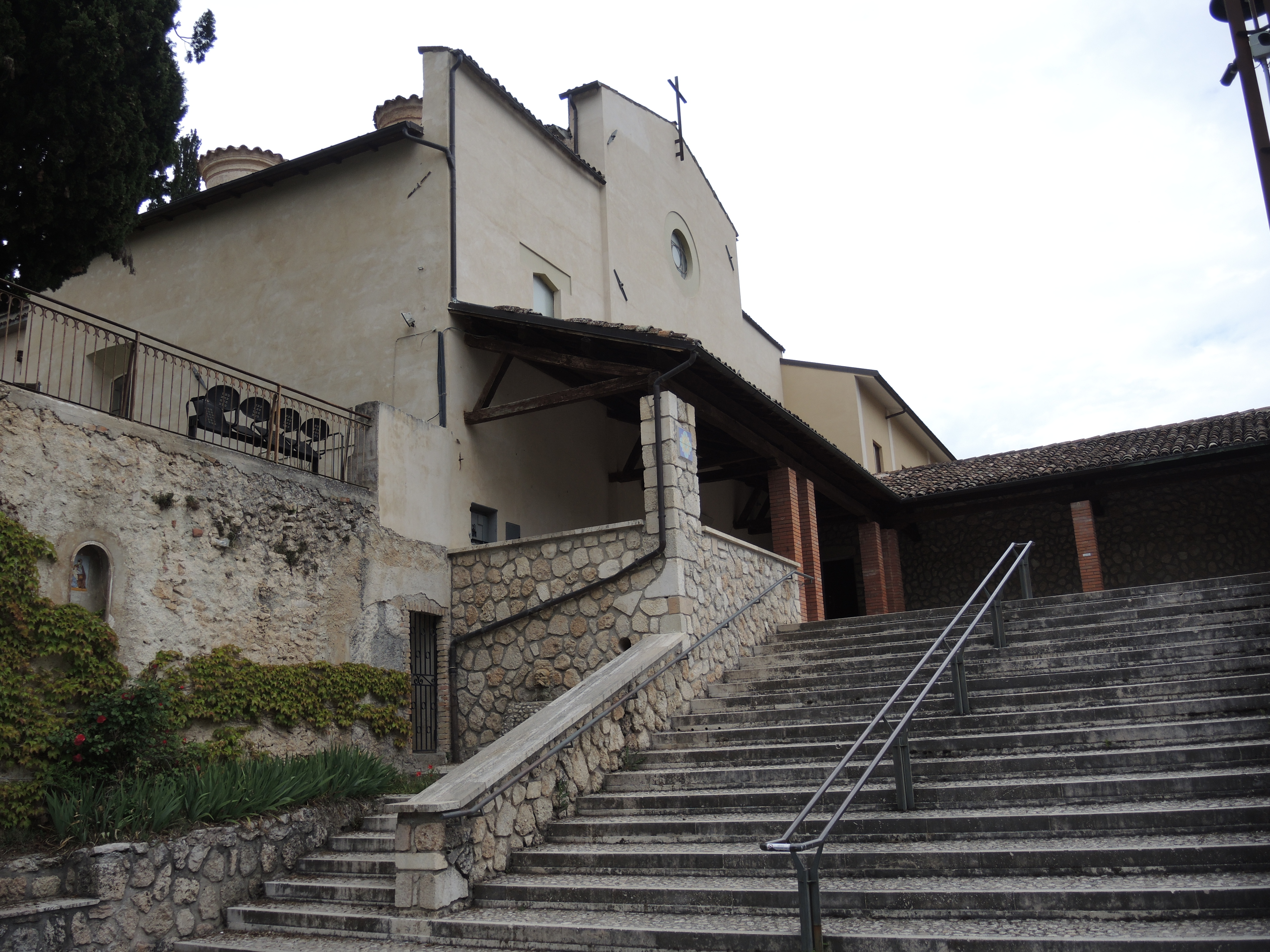 L'Aquila: Convento di San Giuliano